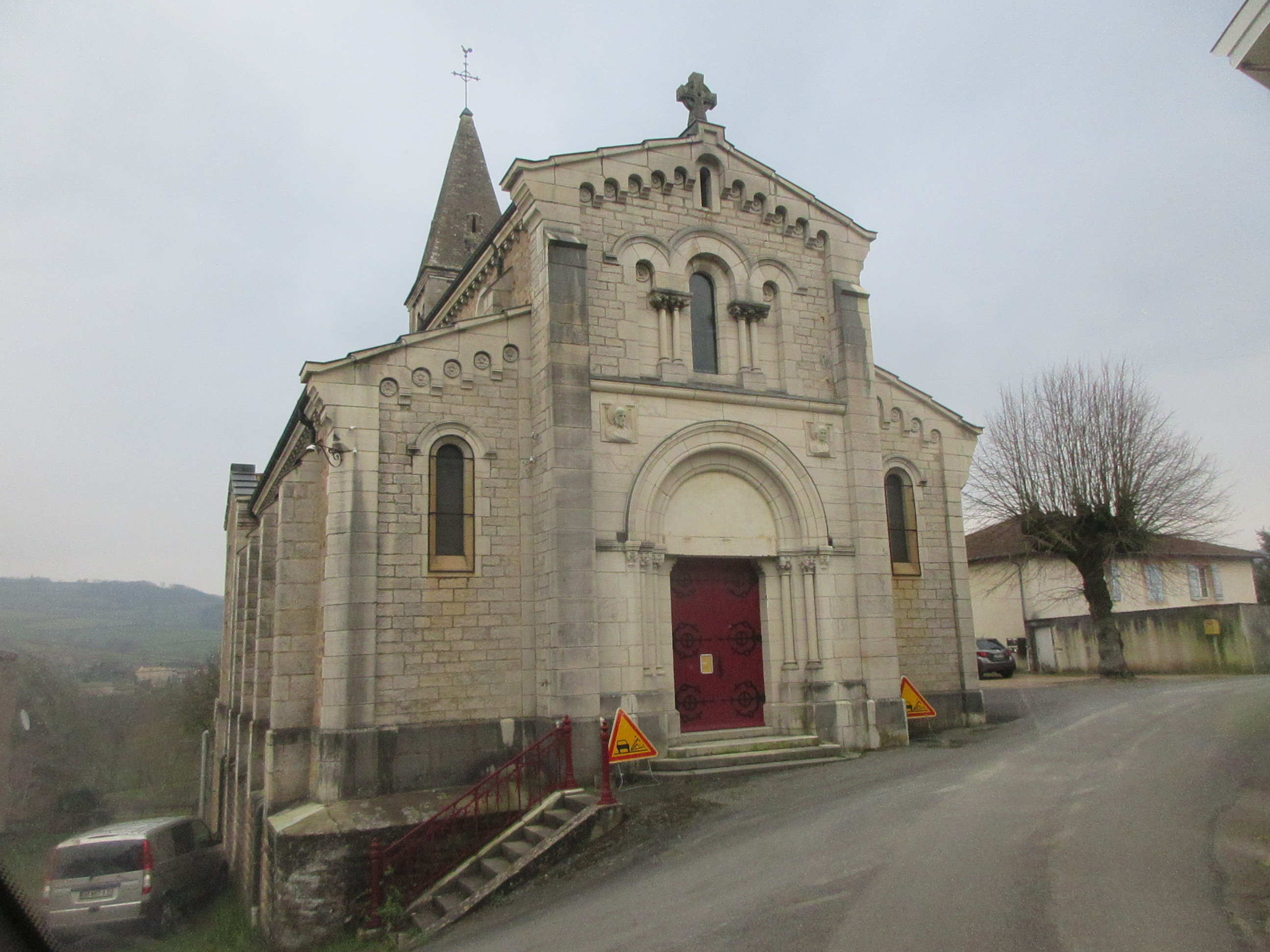 Église Saint-Léger de Saint-Léger-sous-la-Bussière.